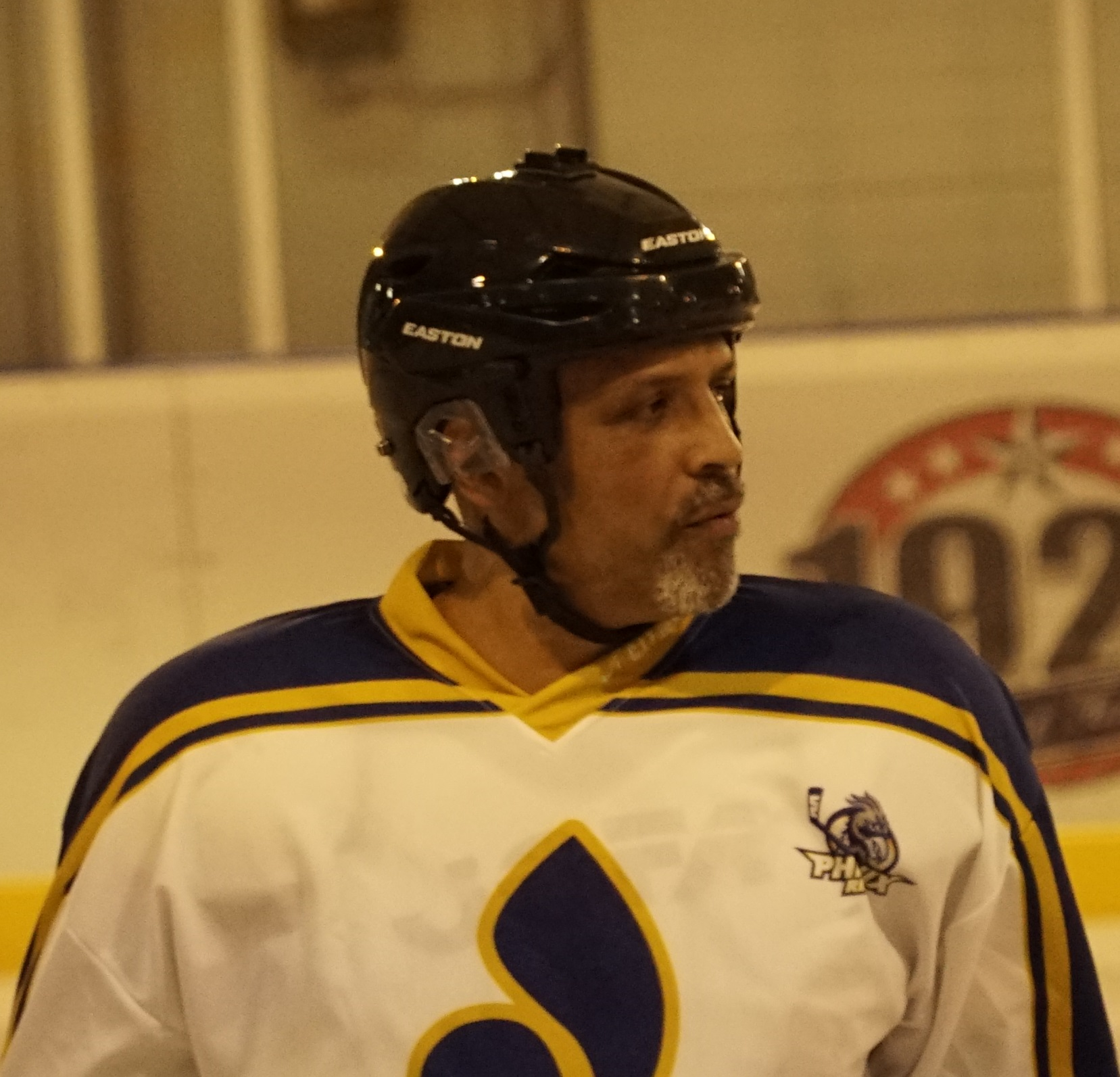 pour le cinquantenaire des Flammes bleues.